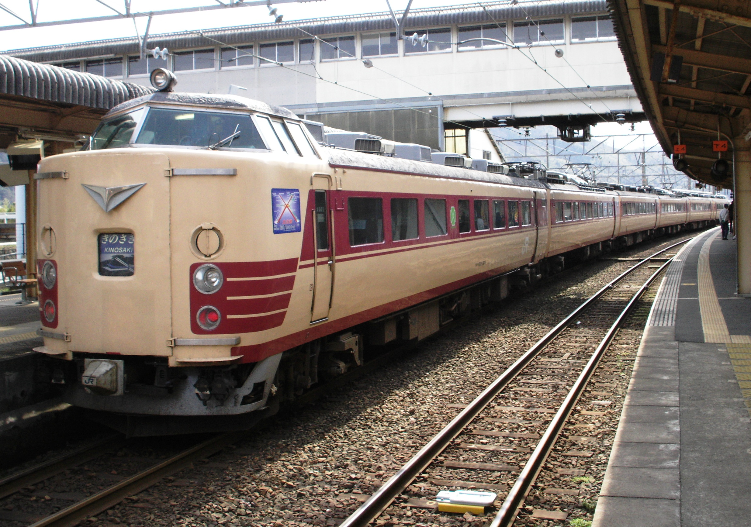 JRWEST Type 183-800 trainset at kinosaki onsen Station